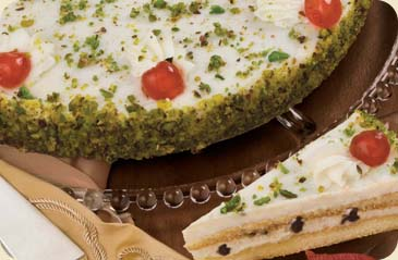 torta fetora